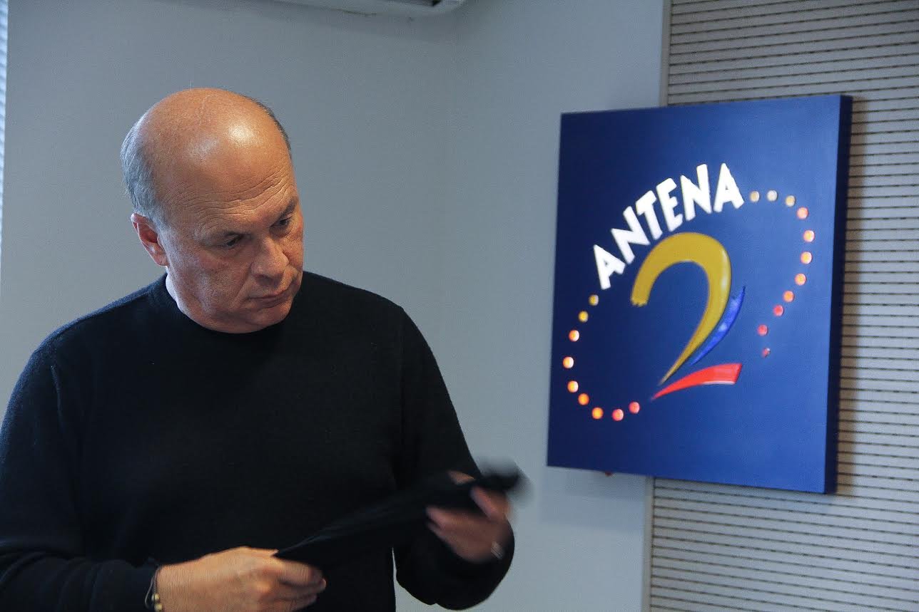 Carlos Antonio Vélez en la cabina de Antena 2